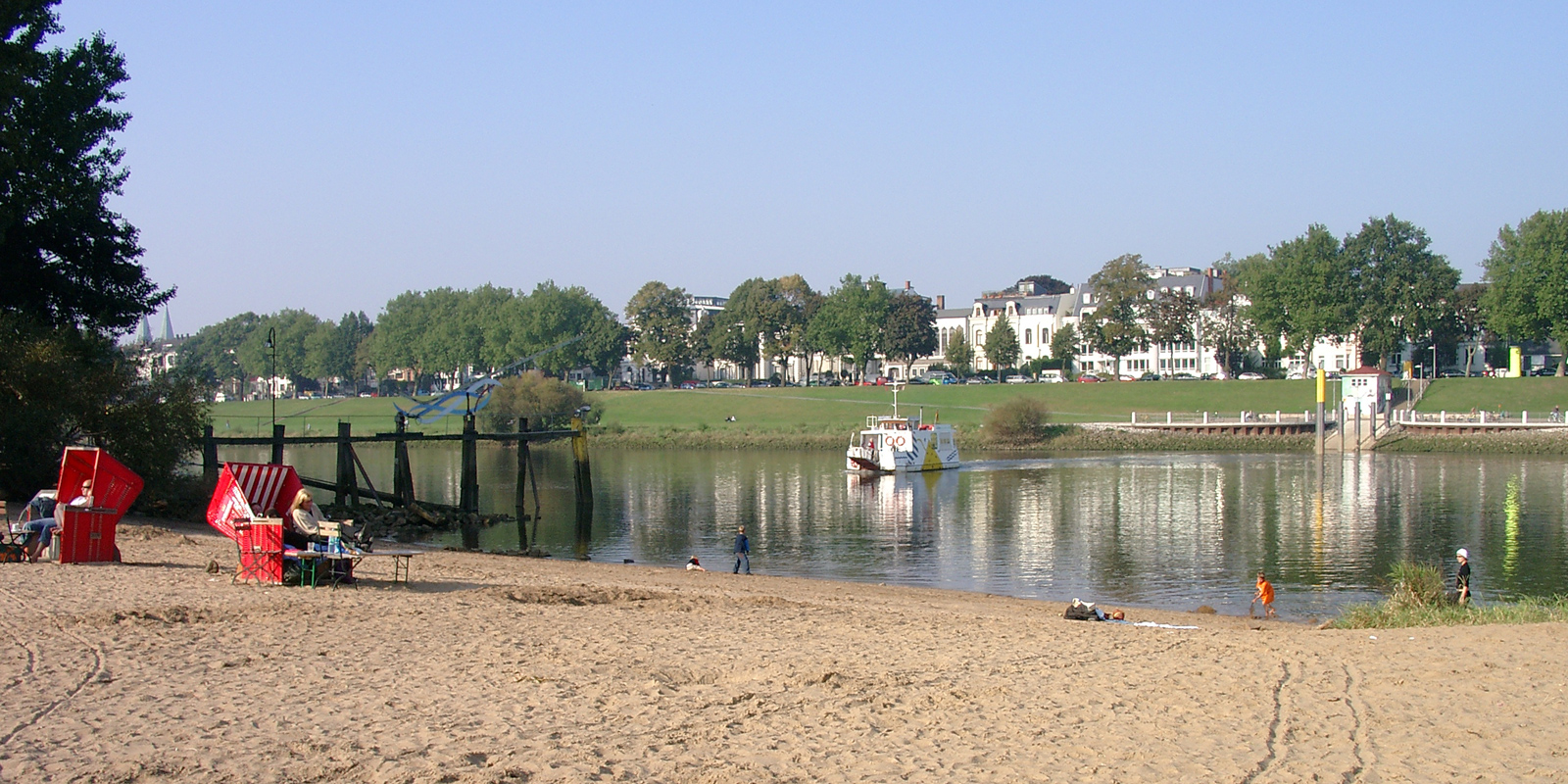 Die Sielwallfähre über die Weser in Bremen, von der linken Weserseite stromabwärts gesehen.